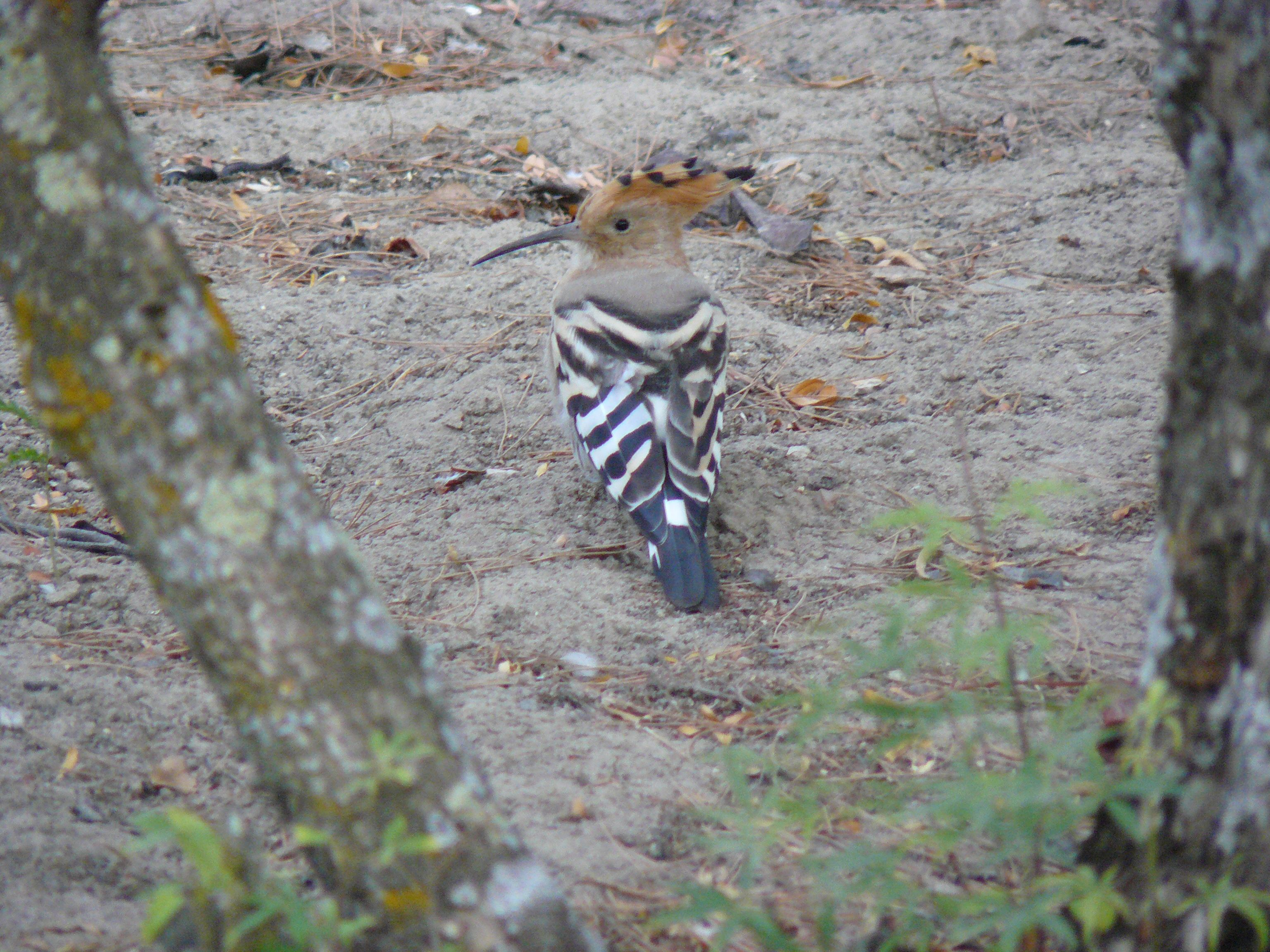 Upupo en Don Benito